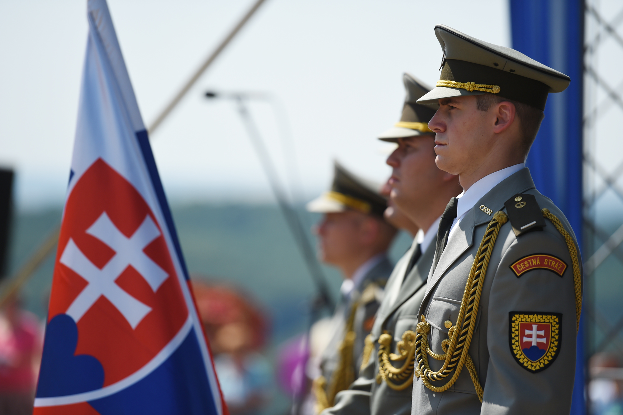 Čestná stráž Ozbrojených síl SR